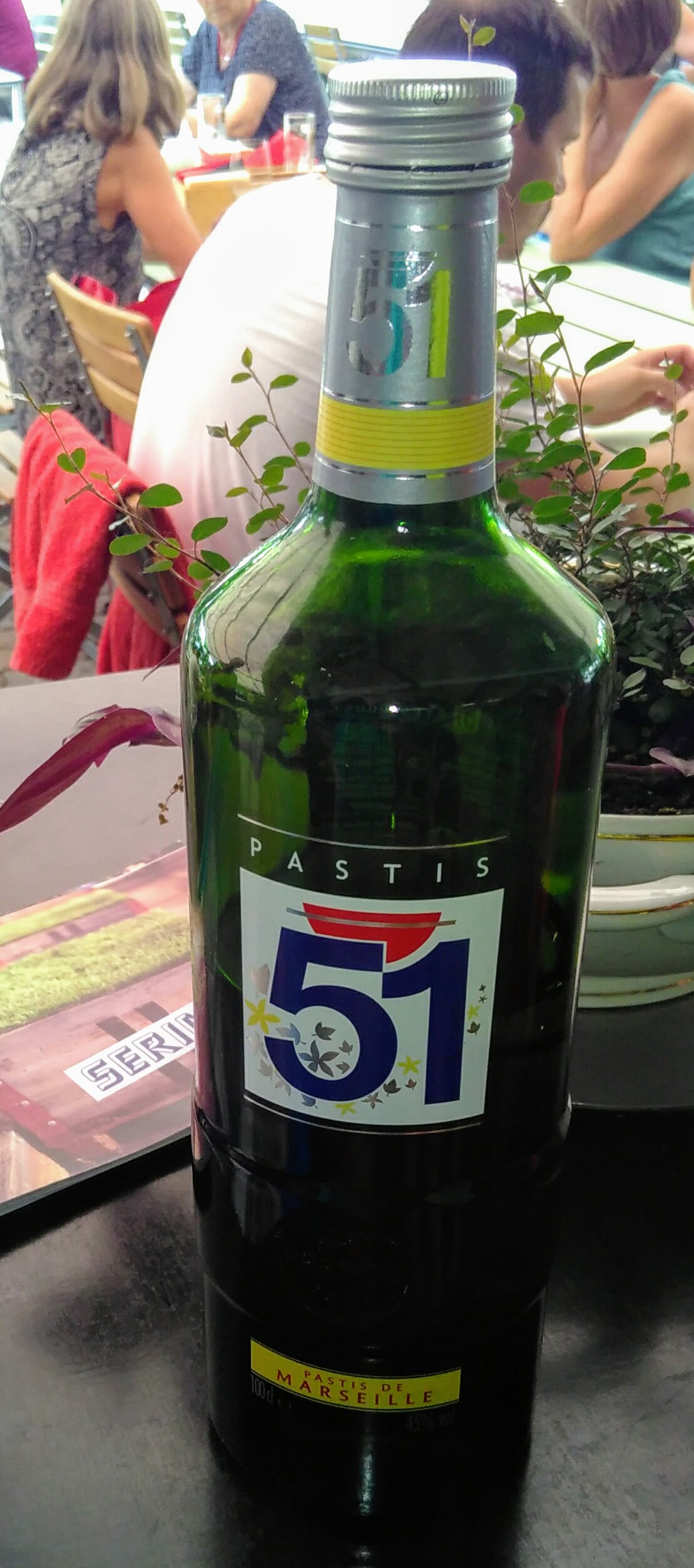 Bouzeille de Pastis 51